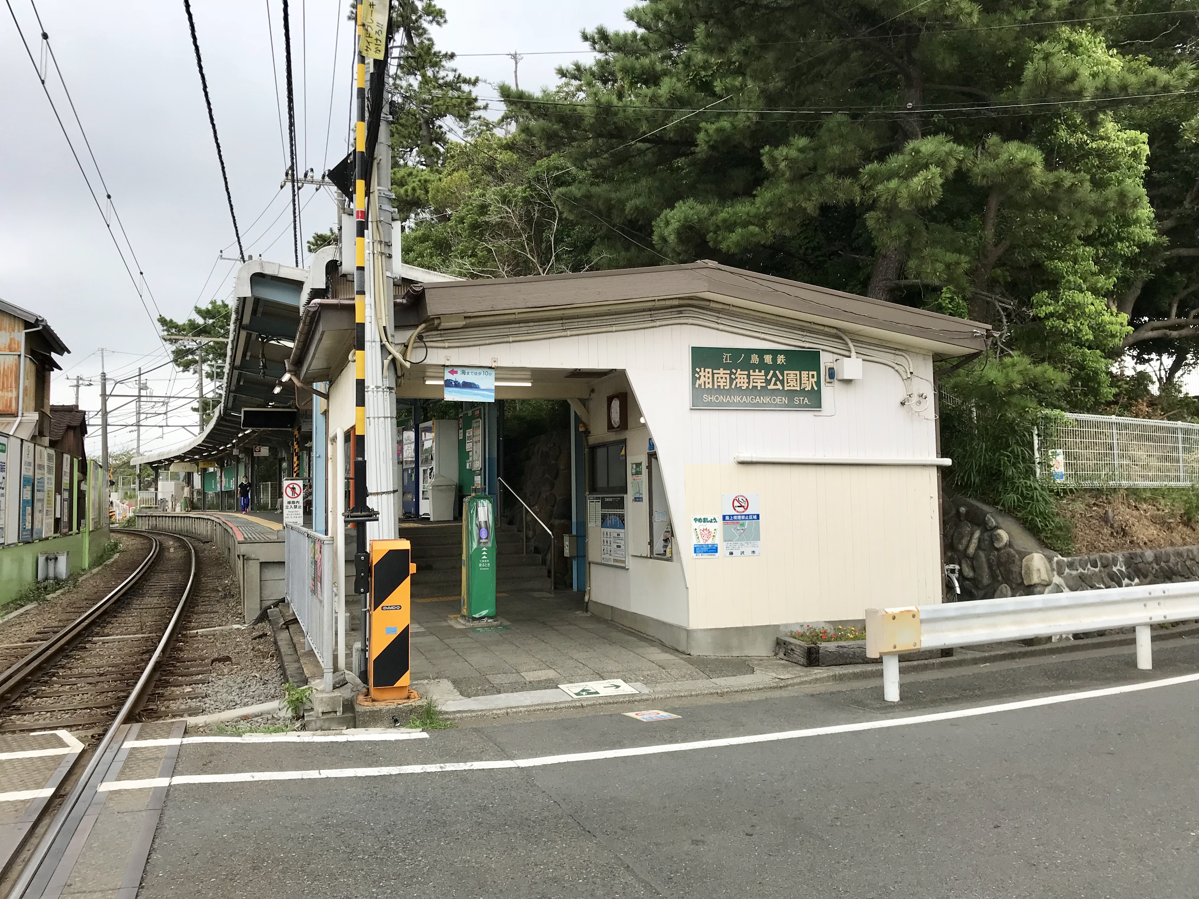 江ノ電湘南海岸公園駅駅舎